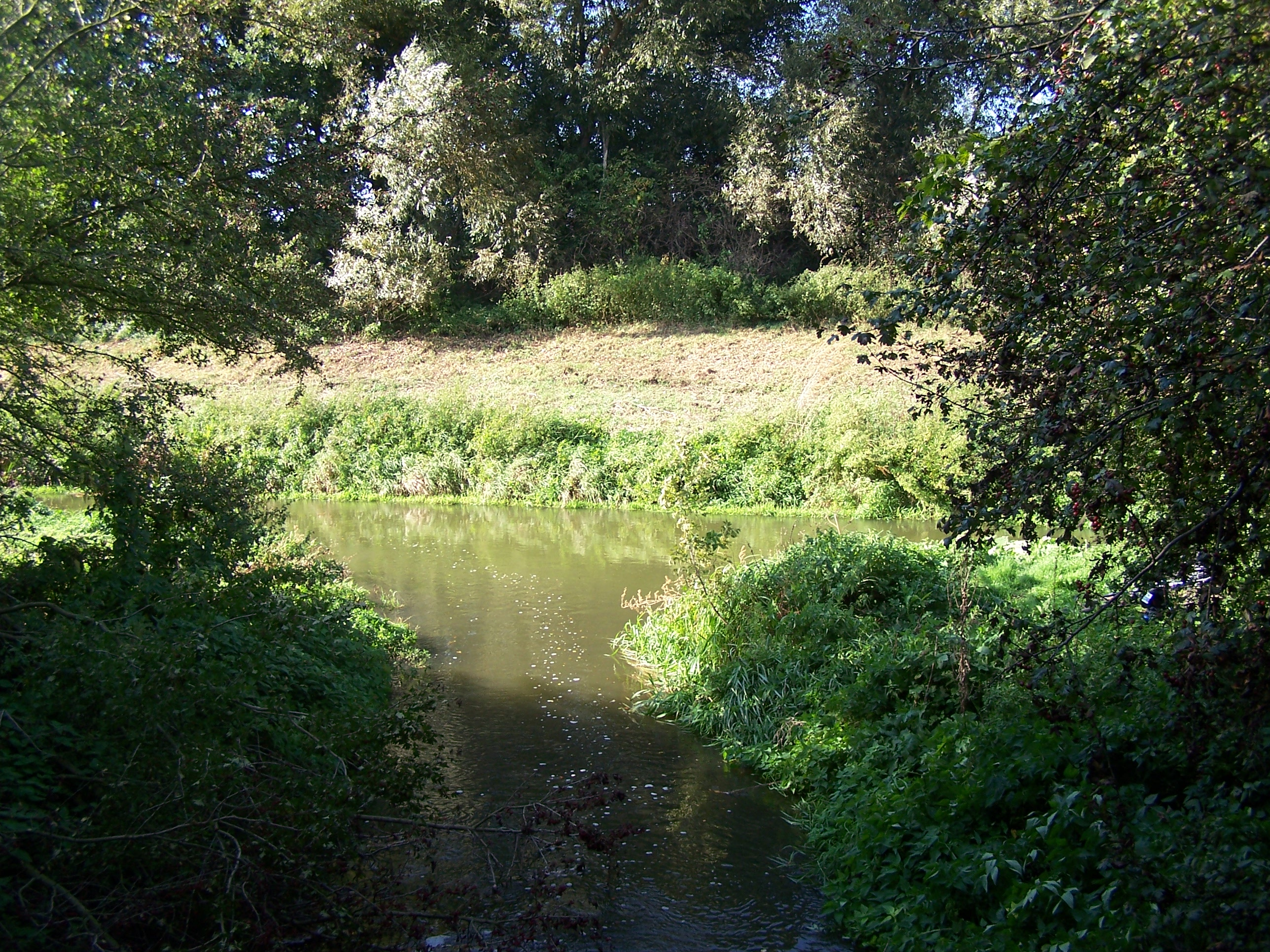 Sánský kanál se zleva vlévá do Mrliny. Vlastní soutok patří k Nymburku, Sánský kanál přitéká z území Budiměřic.